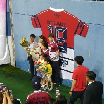 은퇴 기념 판넬 앞에서 기념촬영중인 김은중